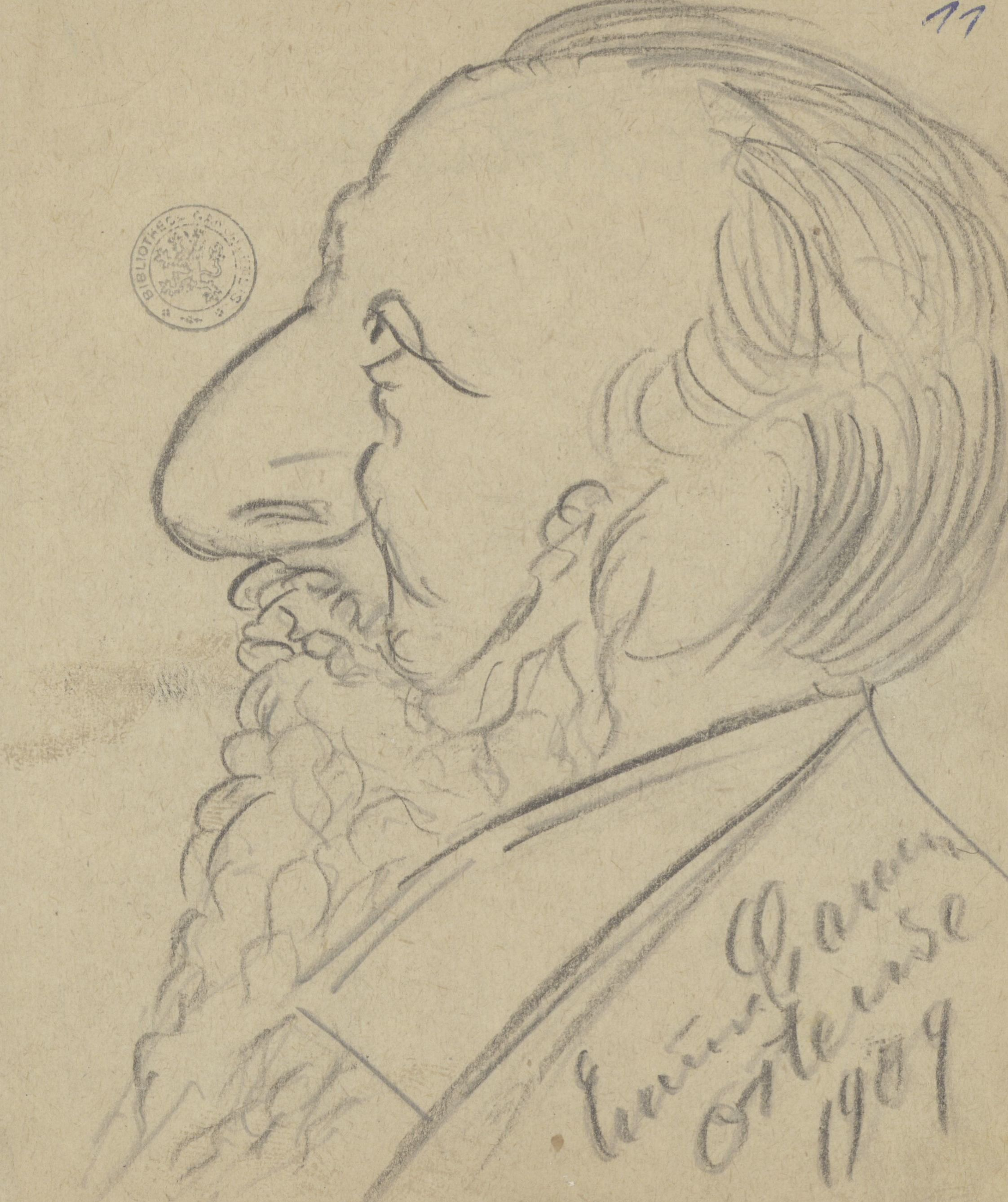 Meer dan waarschijnlijk portret van Emile Mathieu (1844-1932), Belgisch componist uit [verzamelband] karikaturen getekend door Enrico Caruso (1909, Universiteitsbibliotheek Gent)